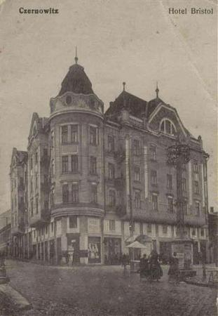 Hotel Bristol Czernowitz